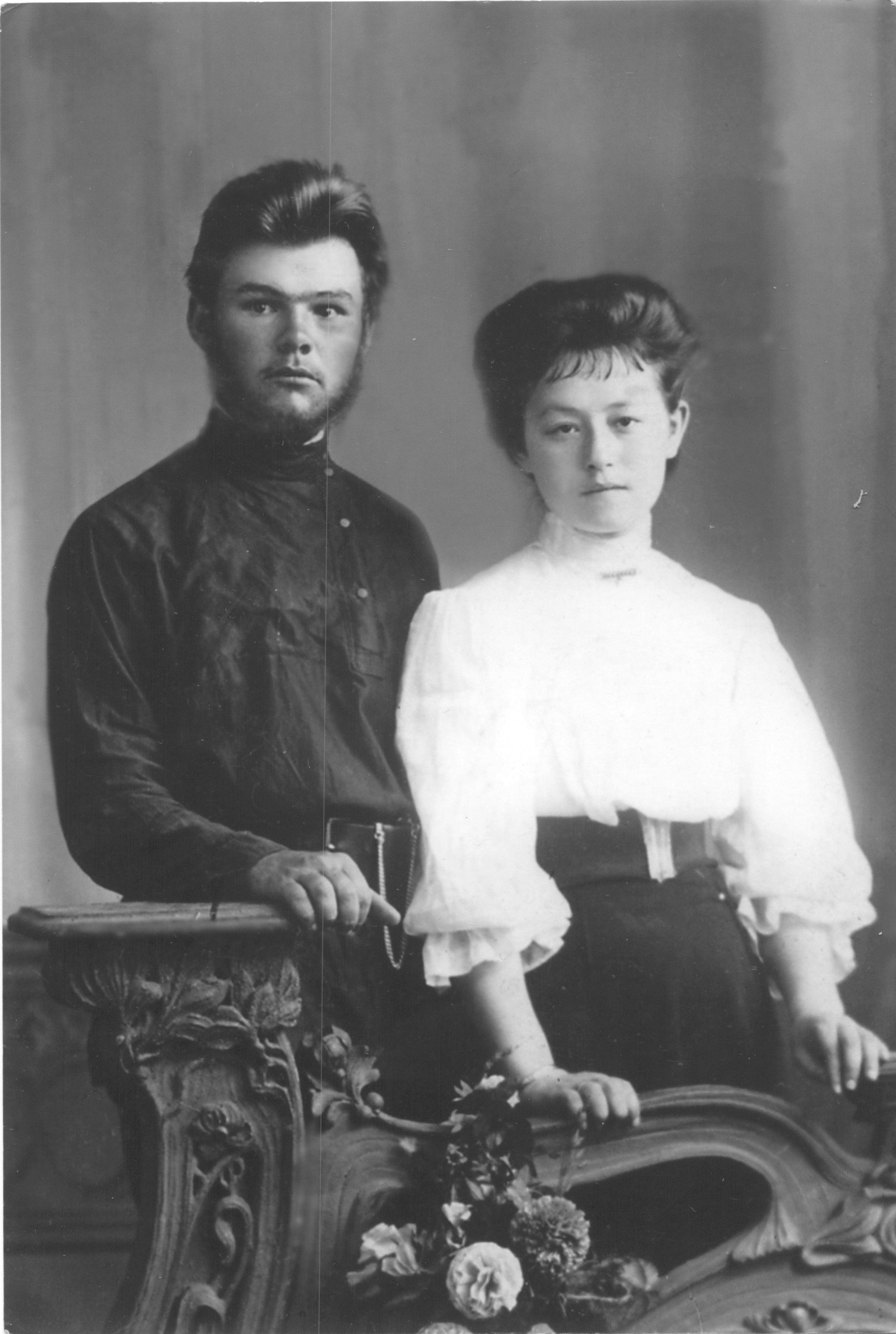 После смерти мужа Екатерина с дочерью Александрой вернулась в Курганскую область